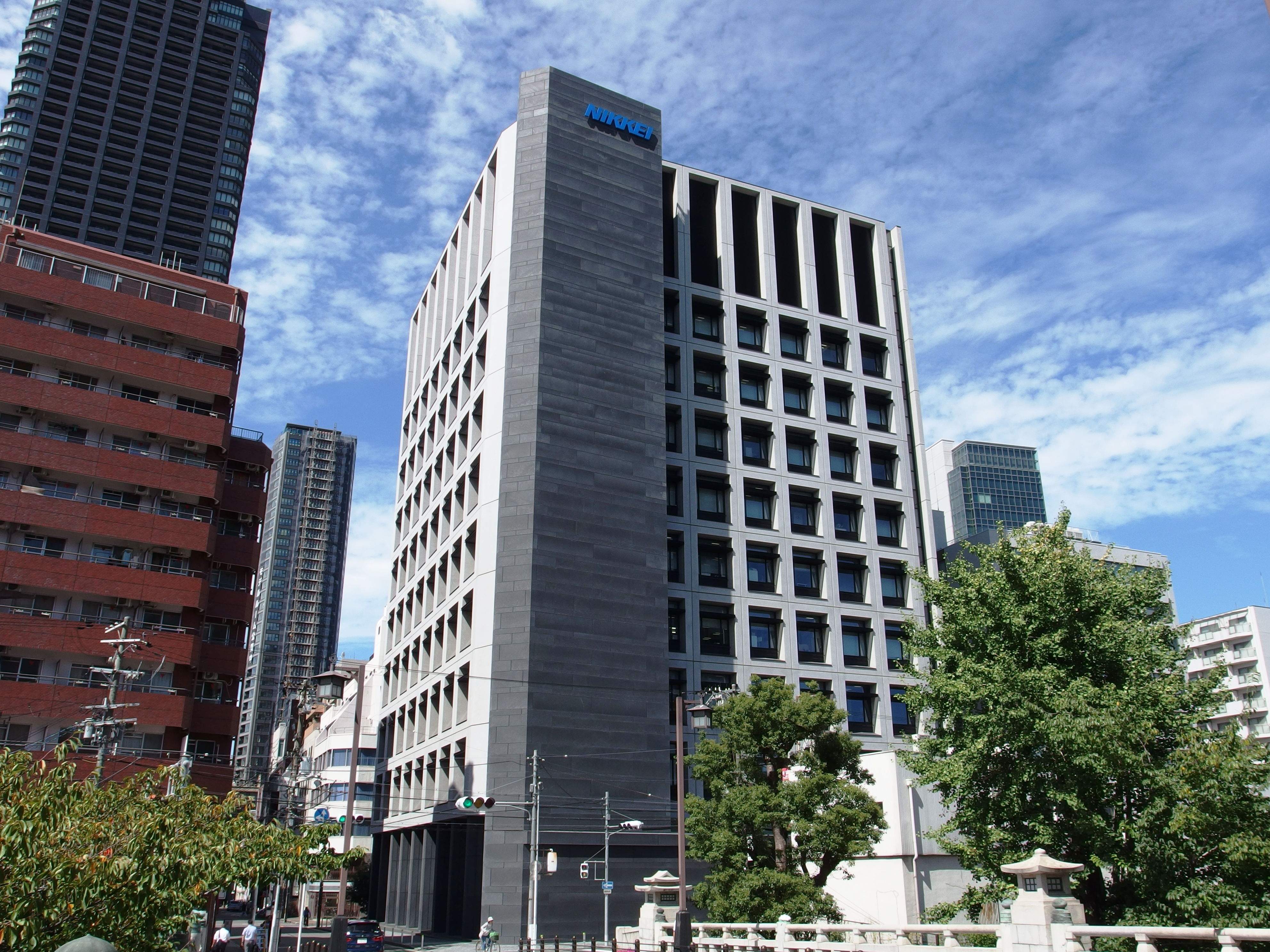 大阪市にある日本経済新聞大阪本社が入居する日本経済新聞大阪本社ビル。